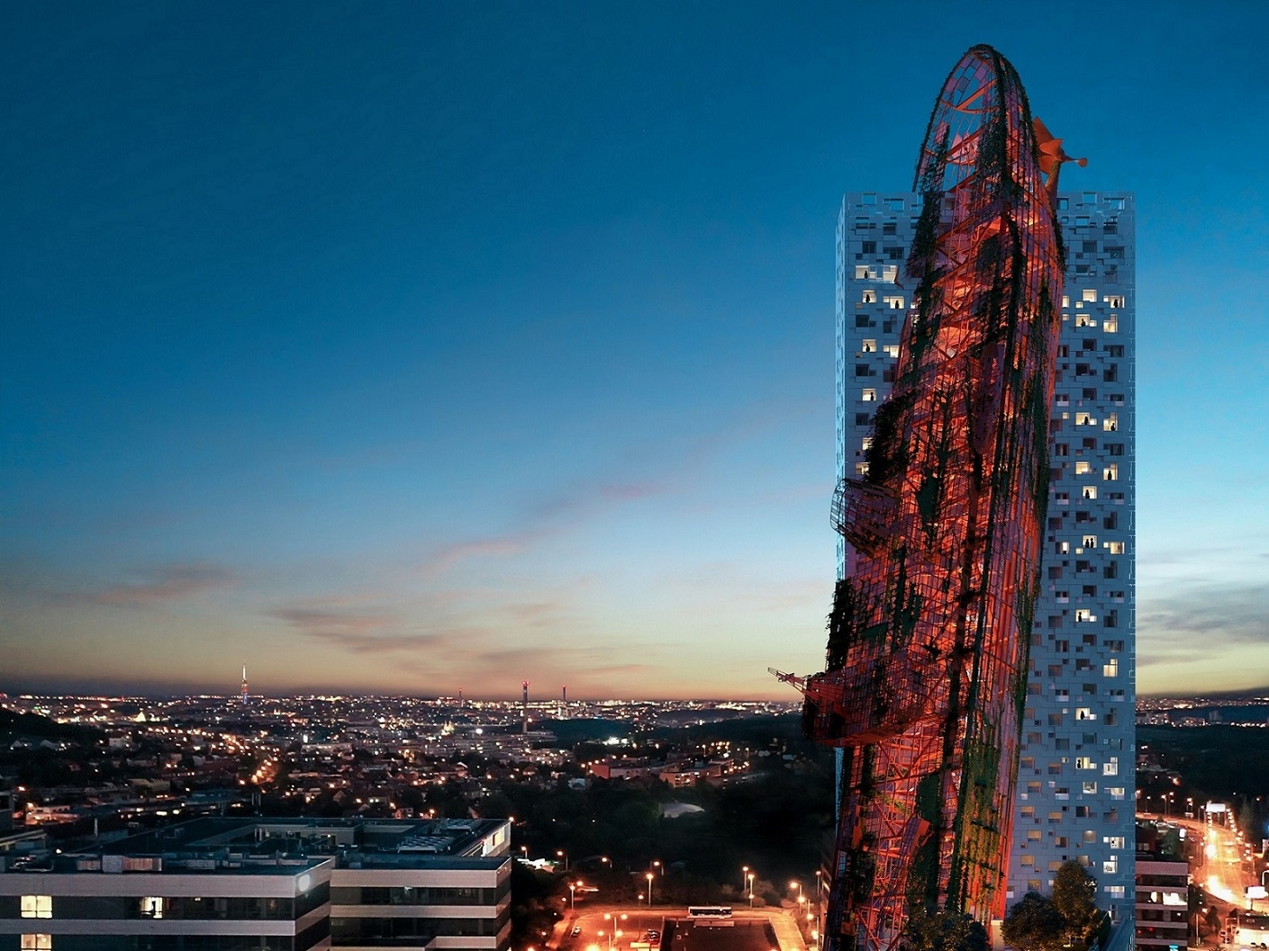 Top Tower